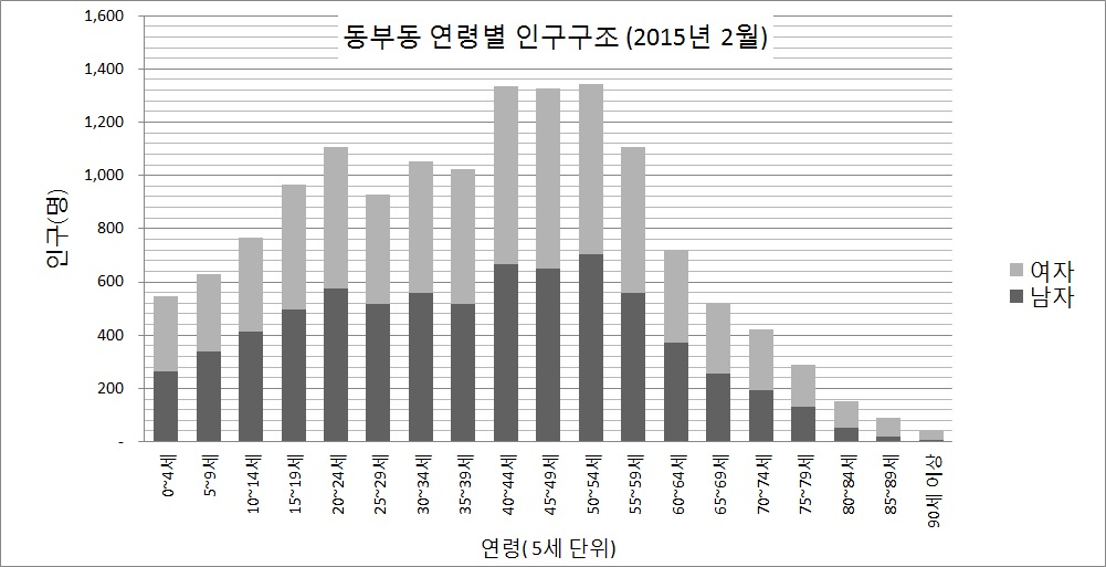 용인시 동부동 연령별 인구구조 (2015년 2월)